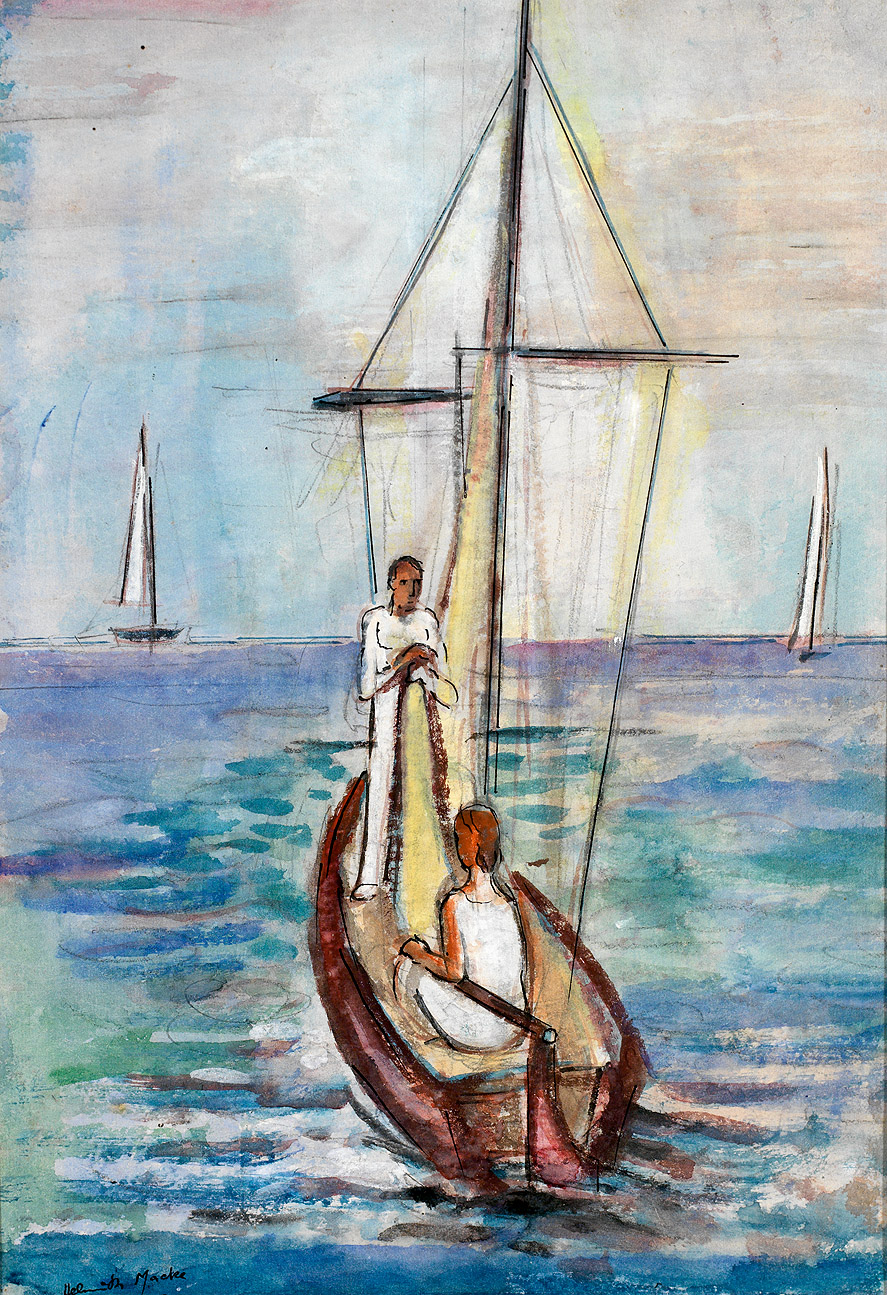 Segelboot auf dem Bodensee. Mischtechnik. 39,5 x 27 cm. von Helmuth Macke (einem Vetter von August Macke), 1934